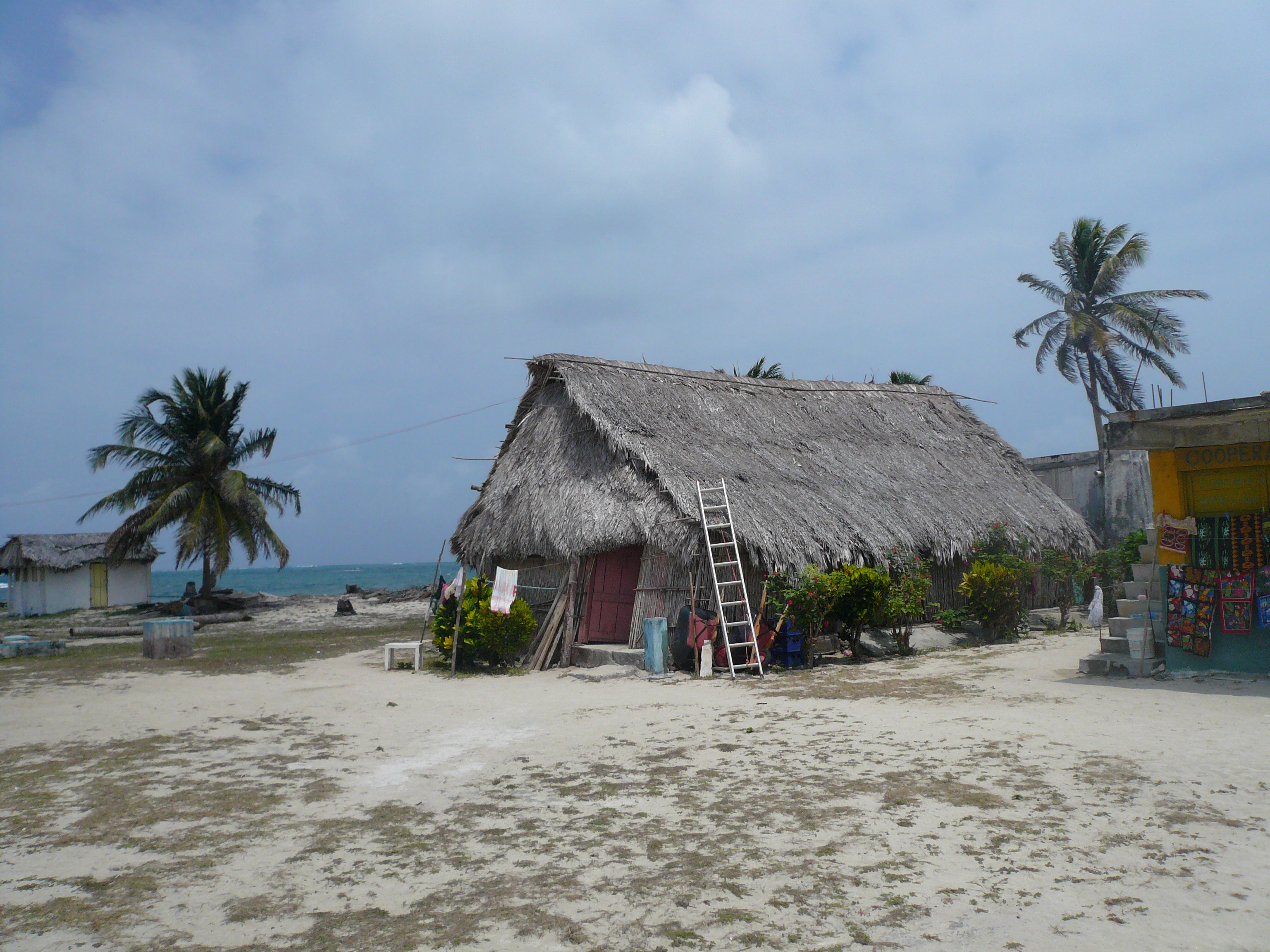 Casa en El Porvenir (Kuna Yala, Panamá)